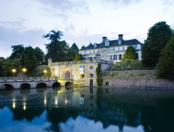 Das Schloss aus der Barockzeit befindet sich auf einer Wallanlage.